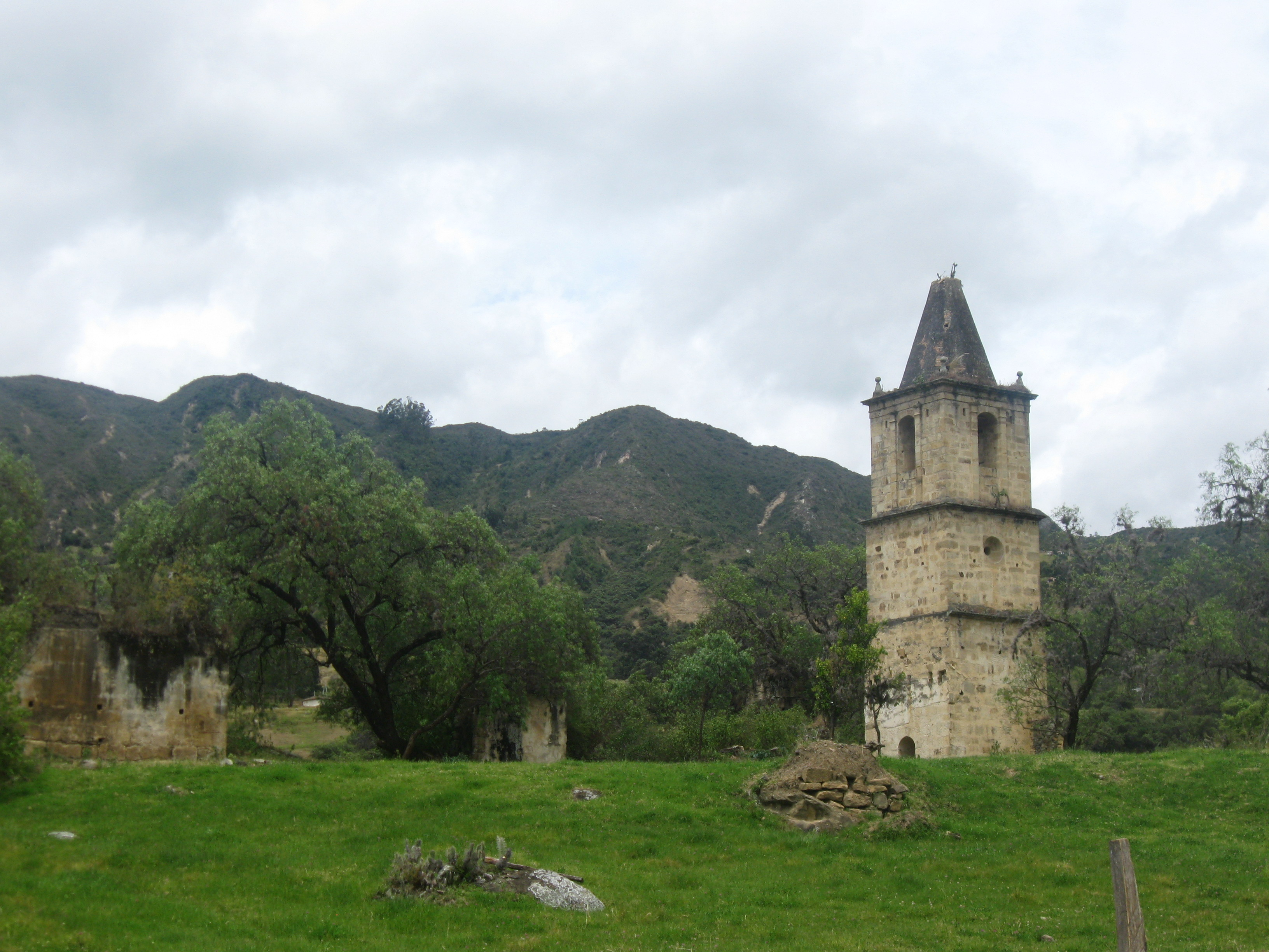 Ruinas de la iglesia construida por los españoles en Sativanorte, Boyaca, Colombia.